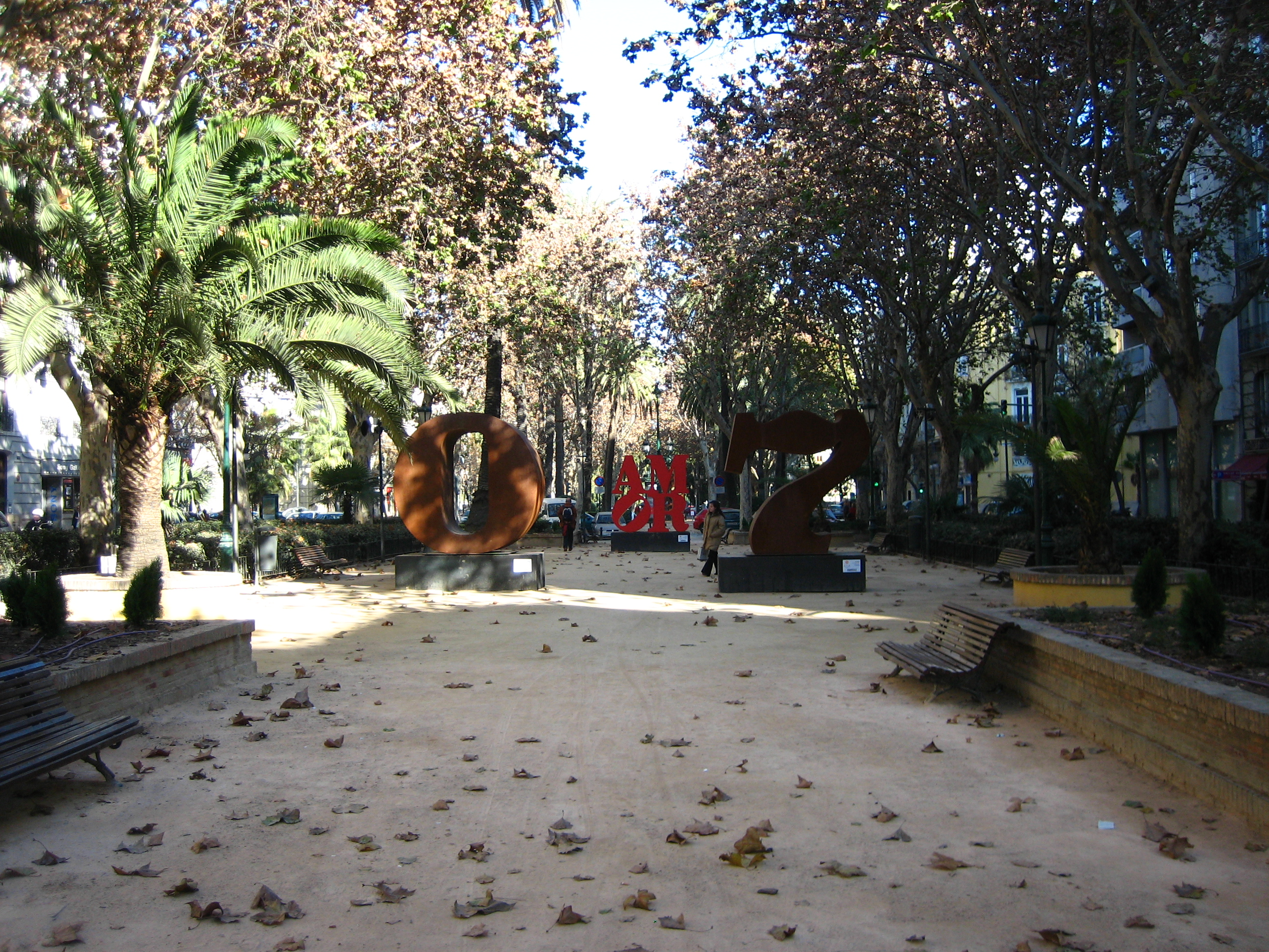 Robert Indiana. "Por amor al arte". Valencia, 8 enero 2007 - 25 febrero 2007.